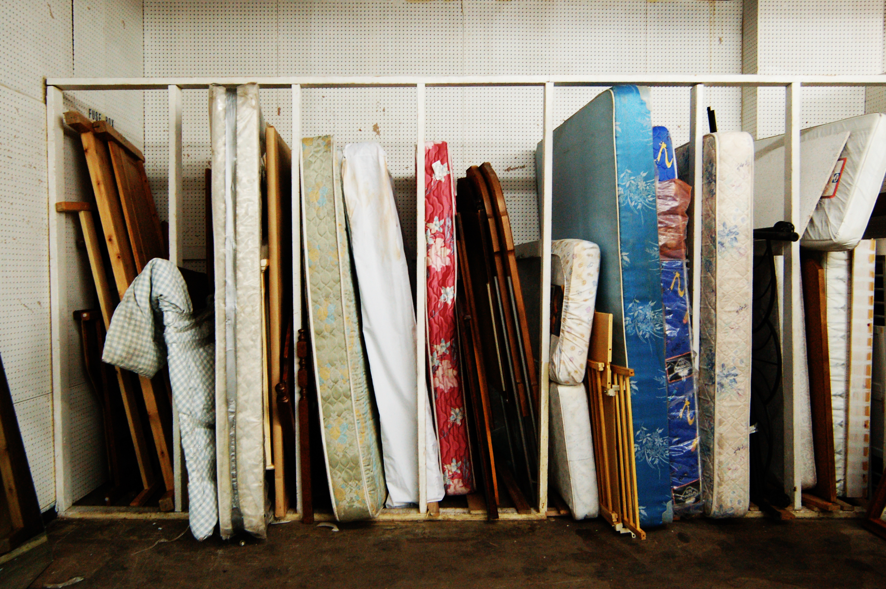 Many mattresses.